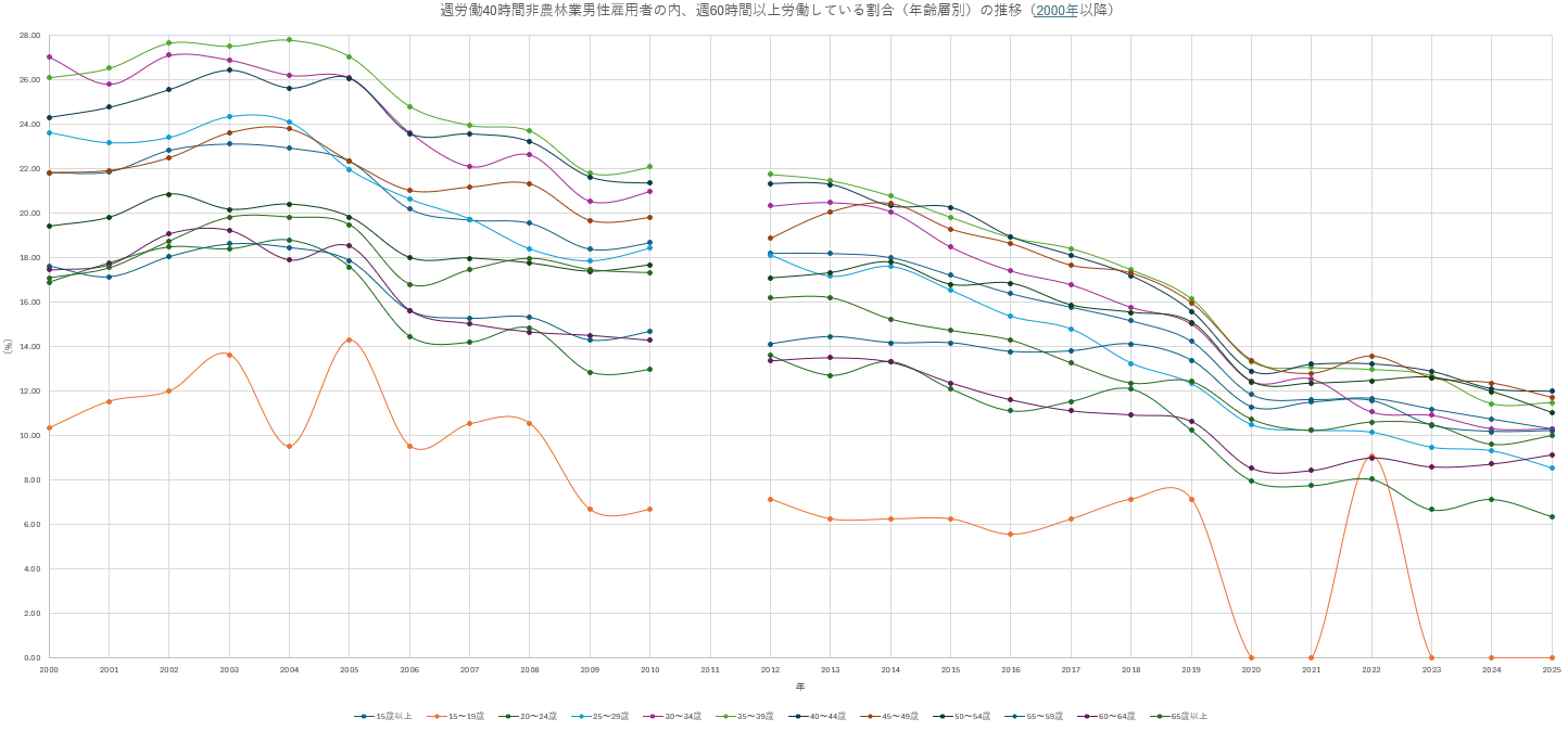 年齢階級別週労働40時間以上男性非農林業労働者に占める週60時間以上労働者の者が占める割合推移（2000年以降）